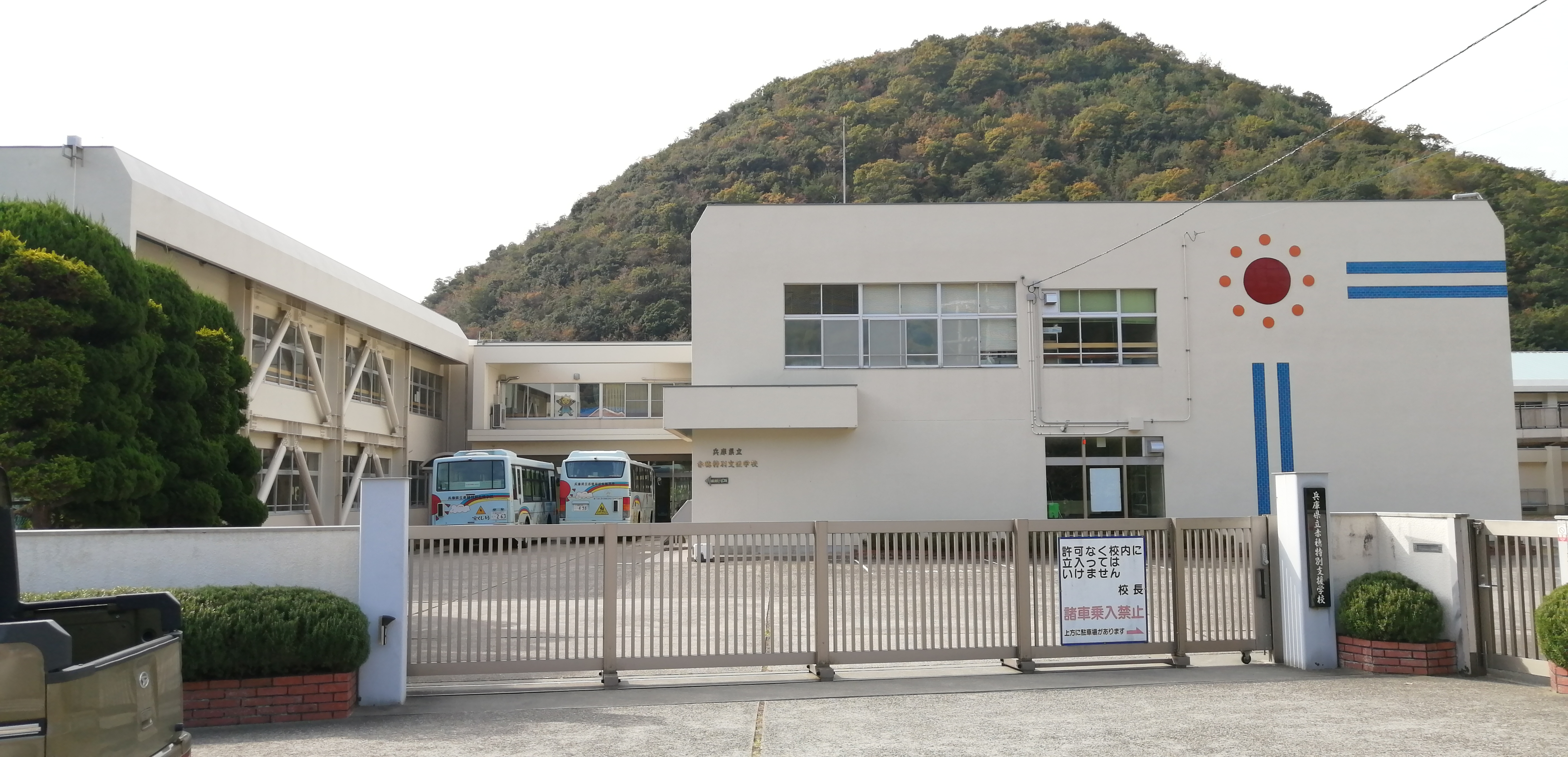 兵庫県立赤穂特別支援学校の校舎の写真を校門の外から撮影